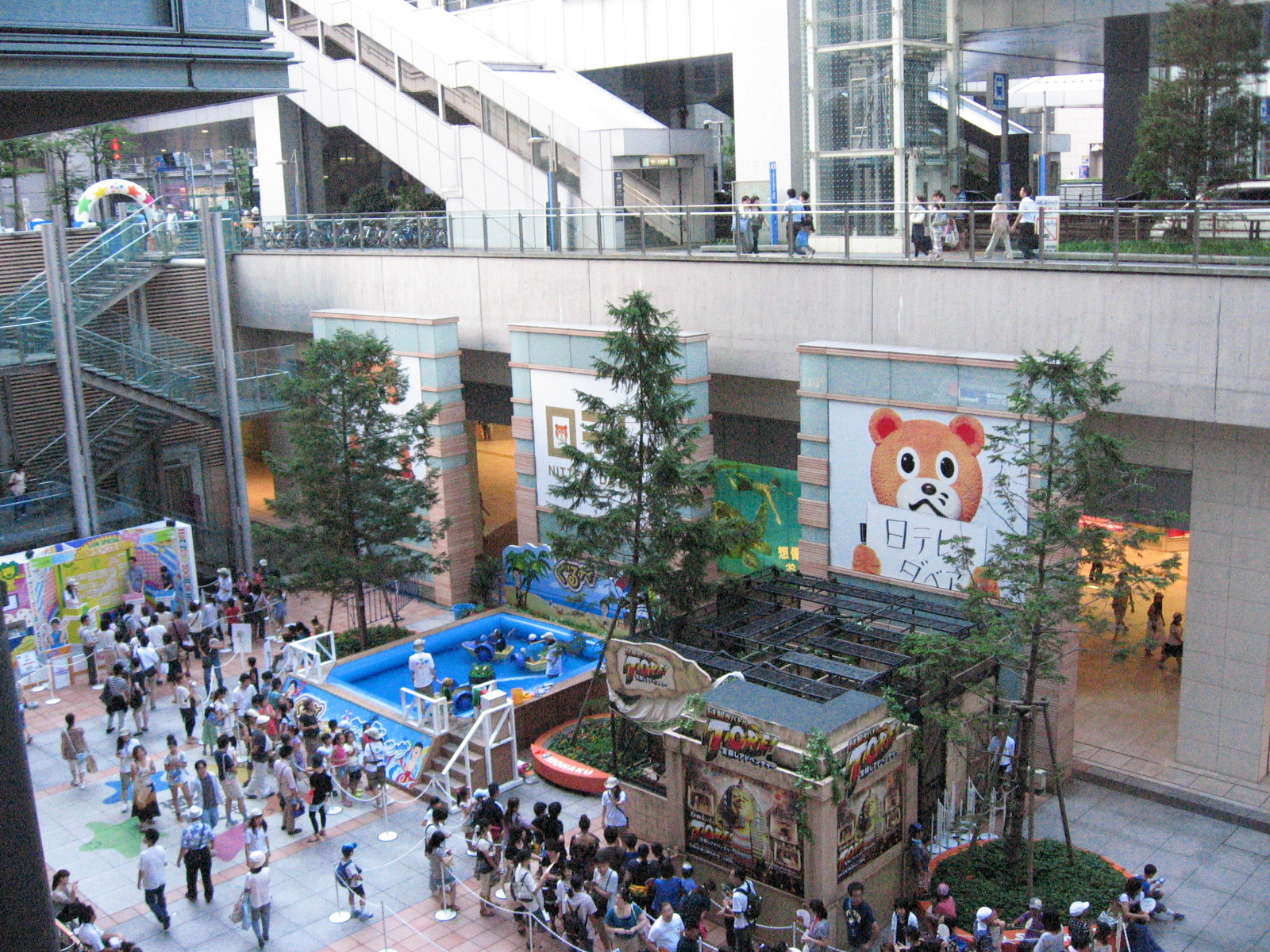 日本テレビの夏イベント『汐博2011』より。